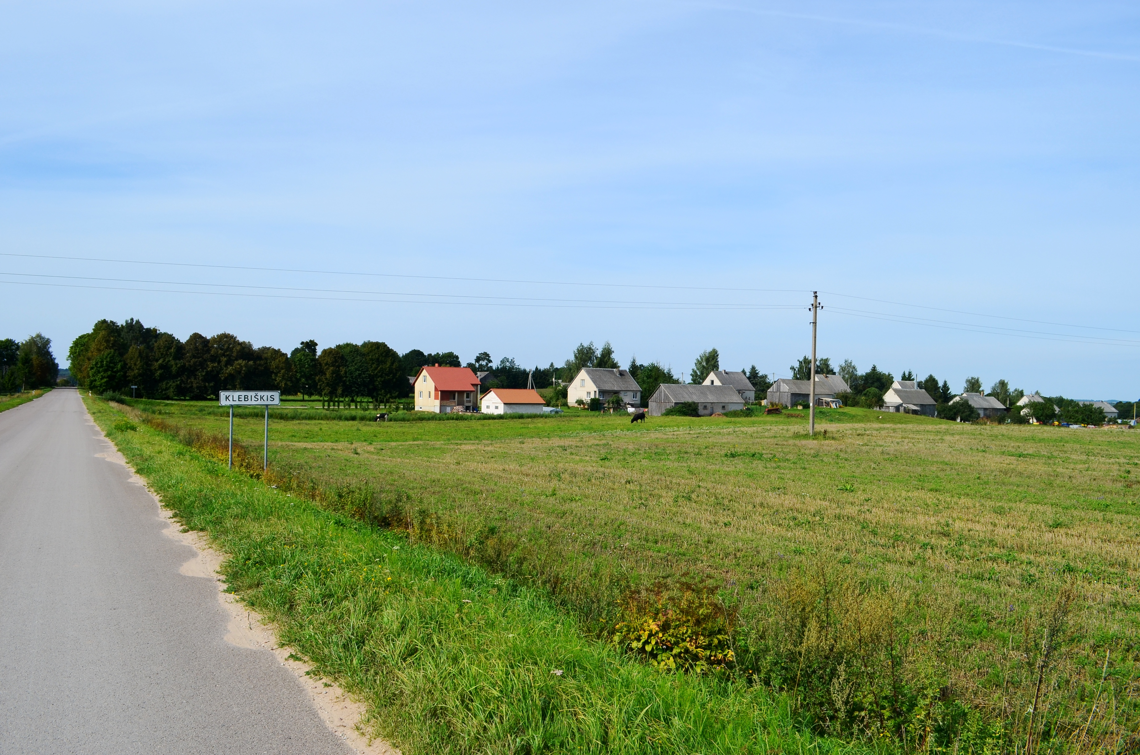 Klebiškis, Prienų raj.